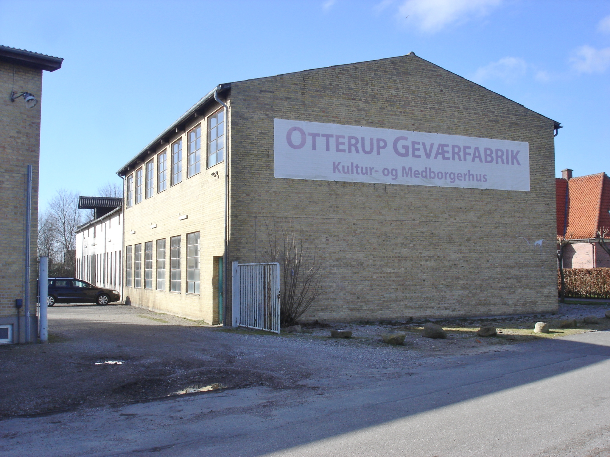 Otterup Geværfabrik, kultur- og medborgerhus